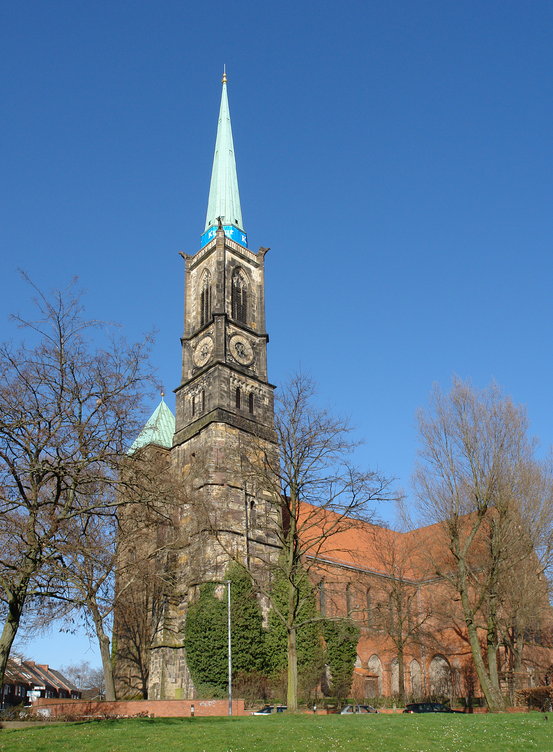 St. Stephani in Bremen, Blick von der Schlachte Das abgebildete Objekt ist ein geschütztes Kulturdenkmal in der Freien Hansestadt Bremen, mit der Nr. 1172 beim Landesamt für Denkmalpflege registriert.